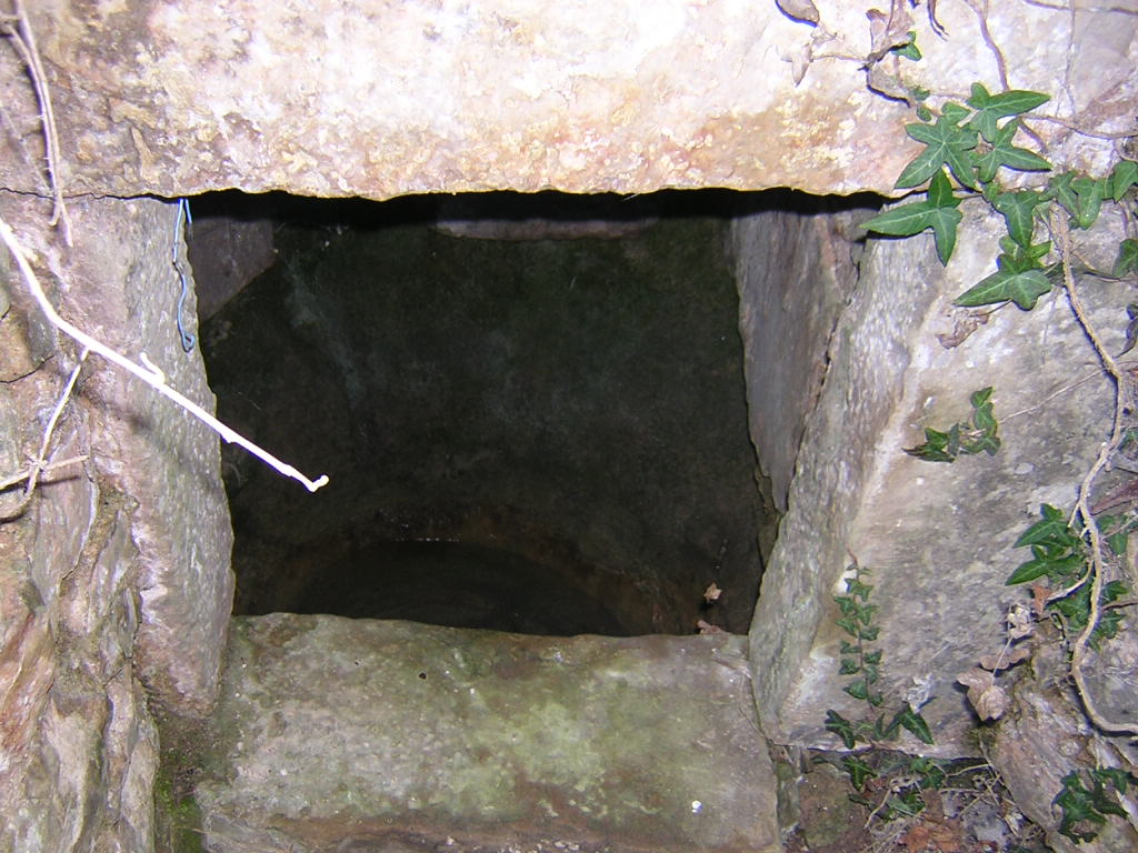 Font de Mussarra (Monistrol de Calders, Moianès)